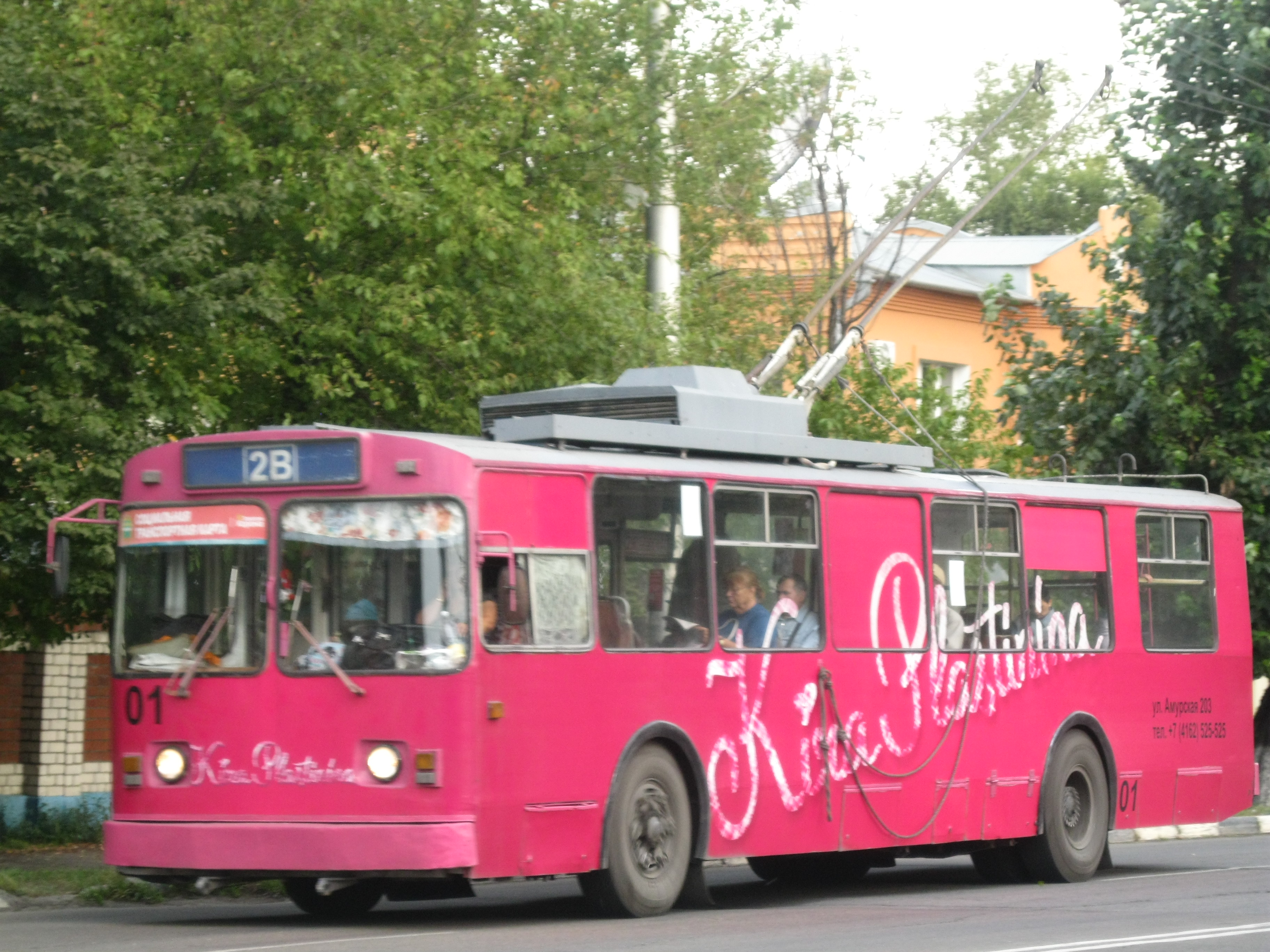 Троллейбус с рекламой магазина российского модельера Киры Пластининой в Благовещенске, Россия